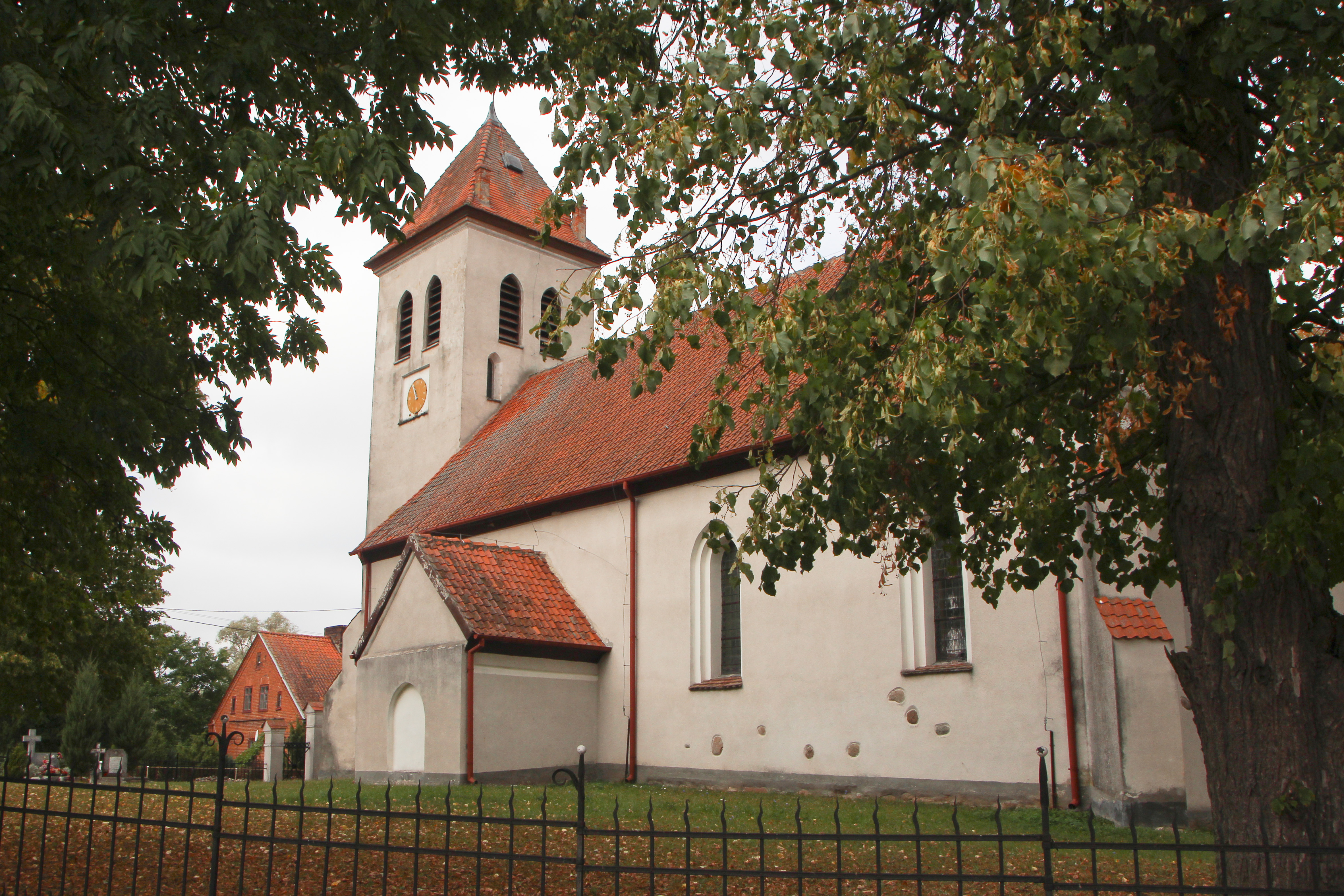 Momajny - rzymskokatolicki kościół parafialny p.w. św. Piotra Apostoła, 4 ćw. XIV, 1818-1820